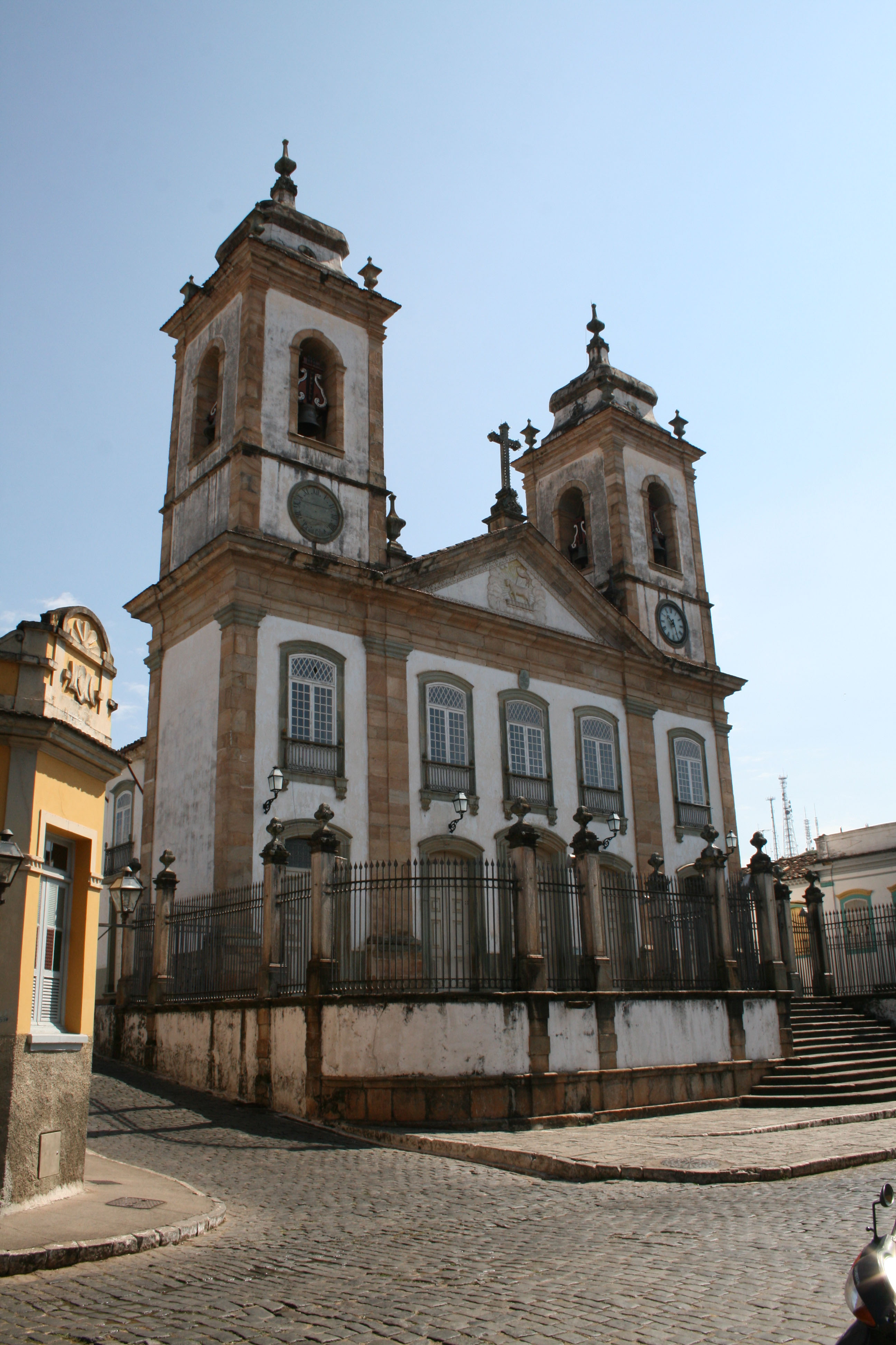 Igreja Matriz de Nossa Senhora do Pilar de São João del-Rei, Minas Gerais.